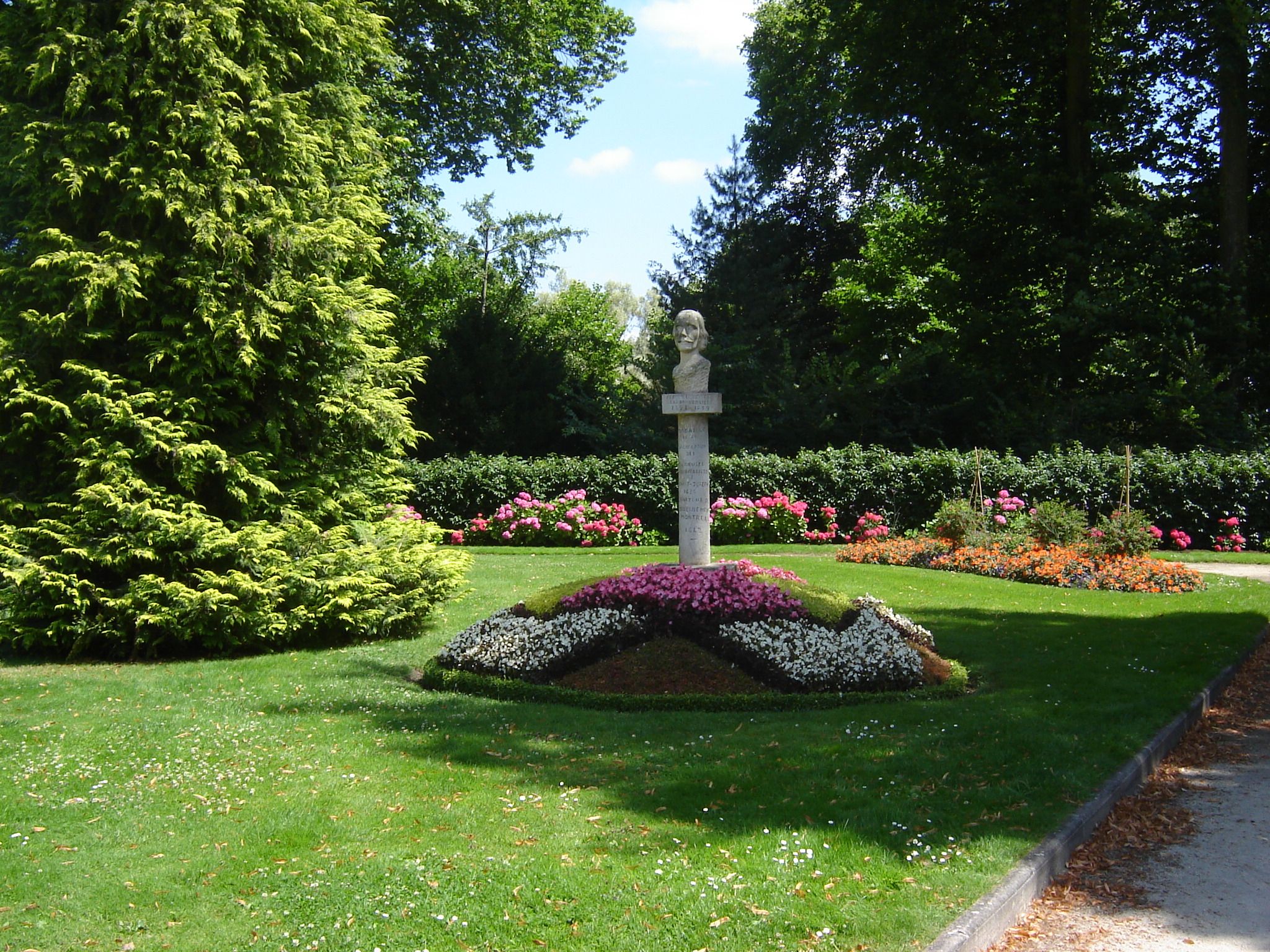 Buste de Jérôme Le Royer de la Dauversière au Parc des Carmes à La Flèche